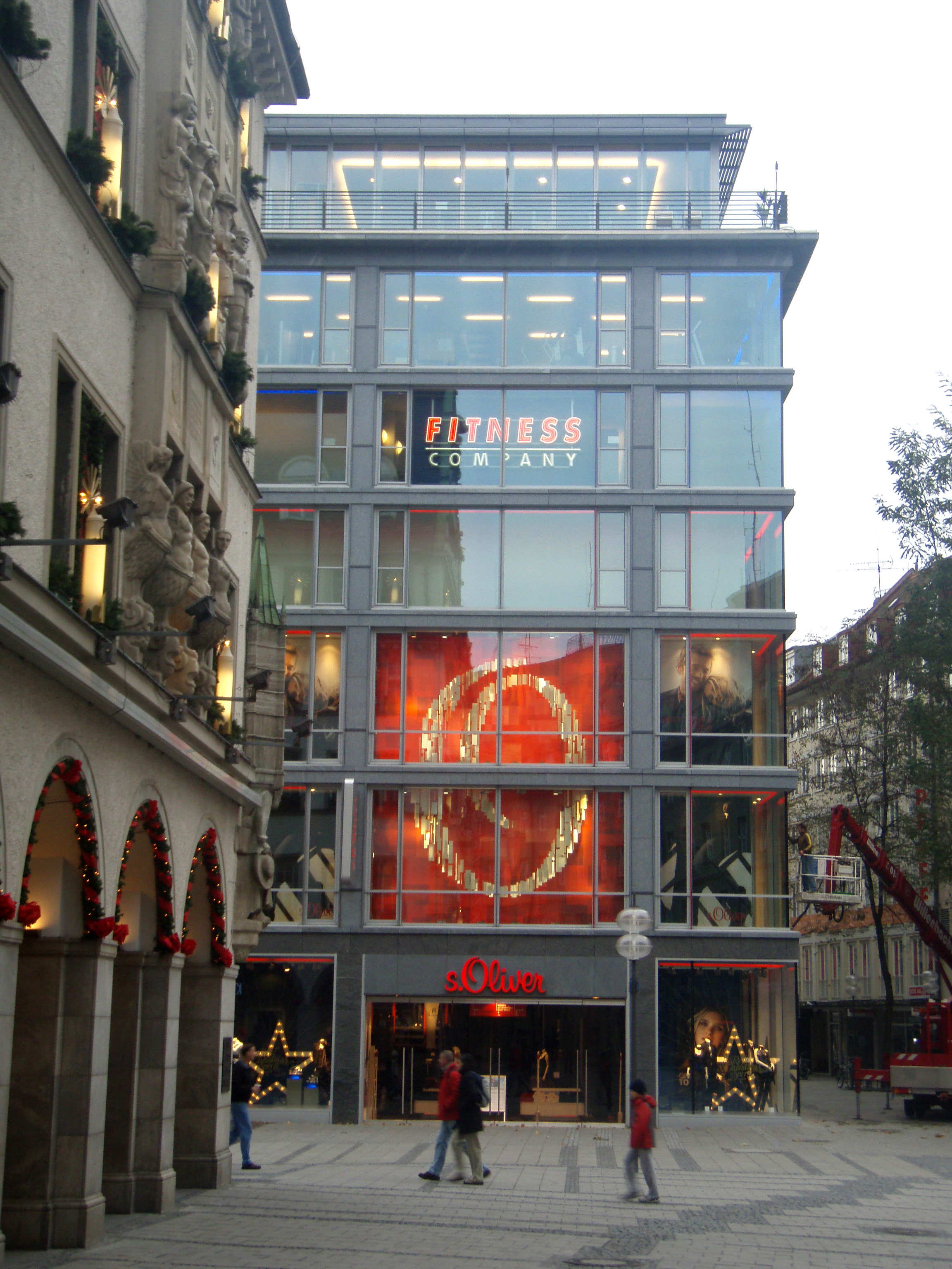 S. Oliver Flag store, Kaufingerstraße/Färbergraben 1, 80331 München